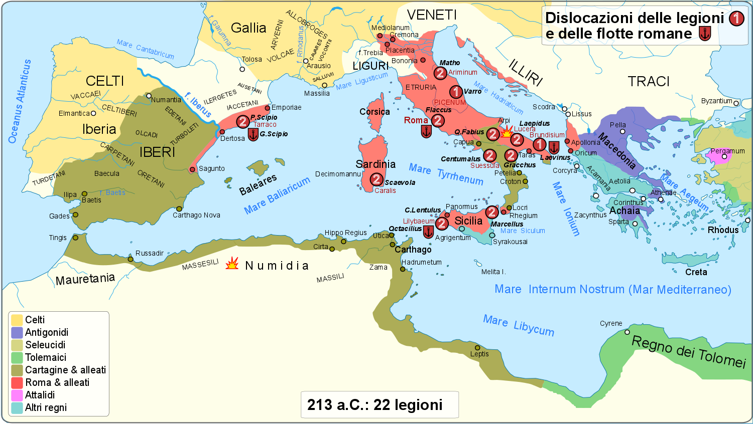 Dislocazione e dimensione delle armate romane nel 213 a.C. durante la seconda guerra punica